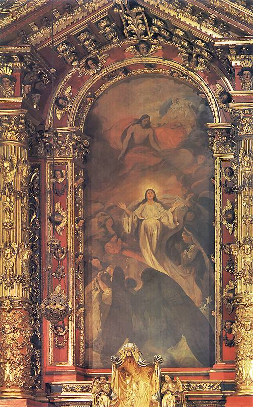 Włodzimierz Tetmajer